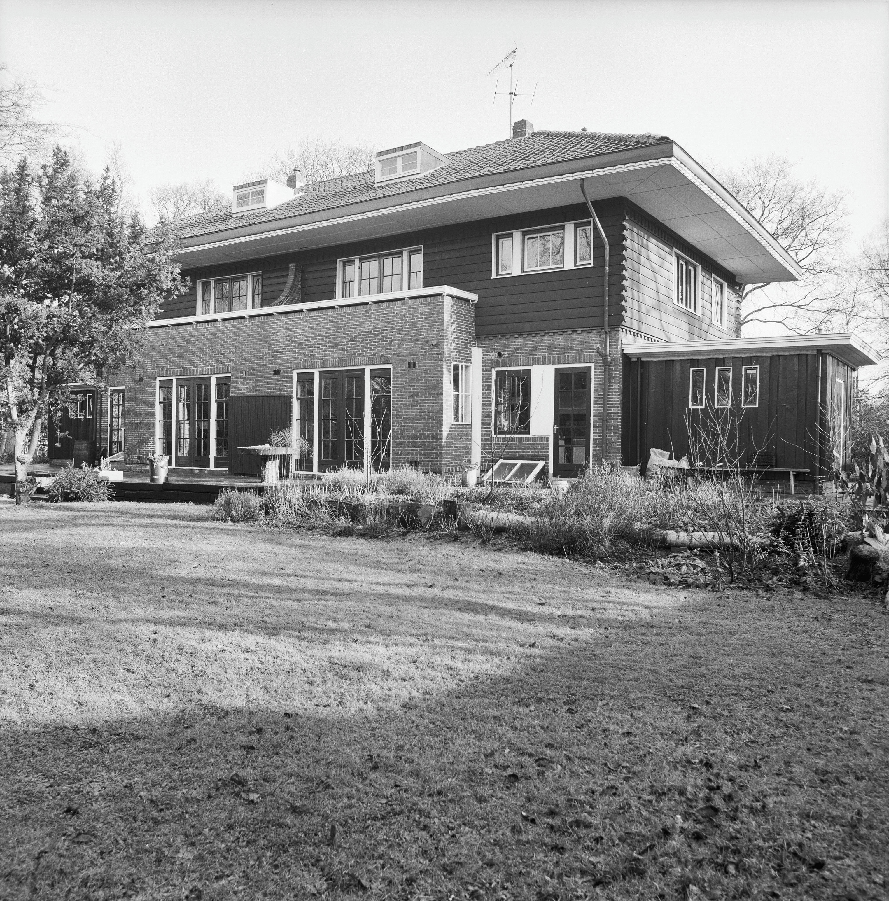 Park Meerwijk: Villa IX-VIII, Meerwijklaan 4-6, E.F. Lacrox 1918